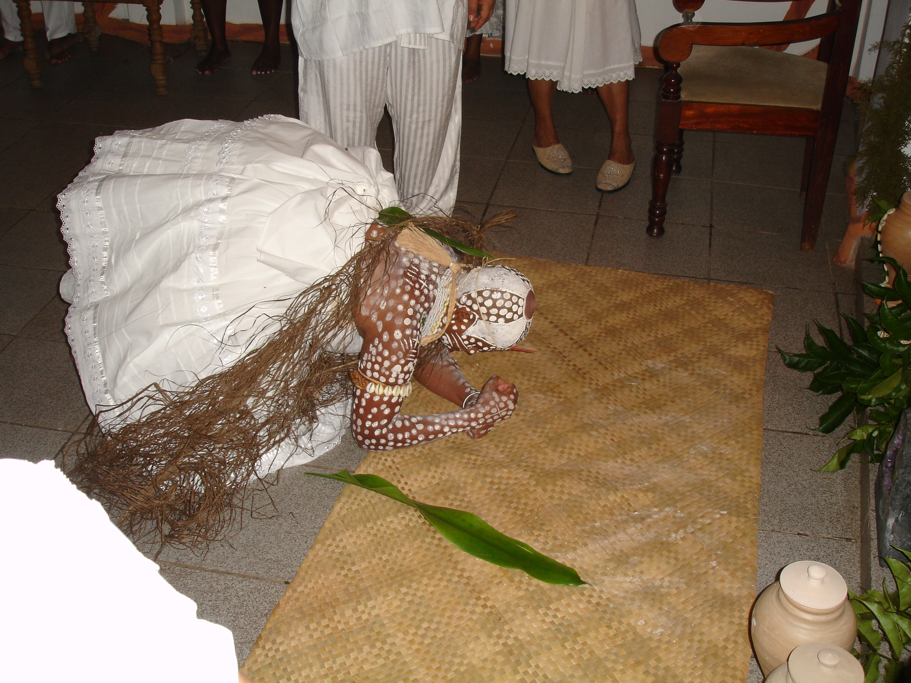 iyawô sobre uma esteira. Orossi, Salvador, Bahia, Brasil